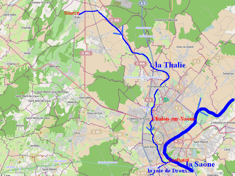 Cours de la rivière Thalie affluent de la Saône en Bourgogne (France)